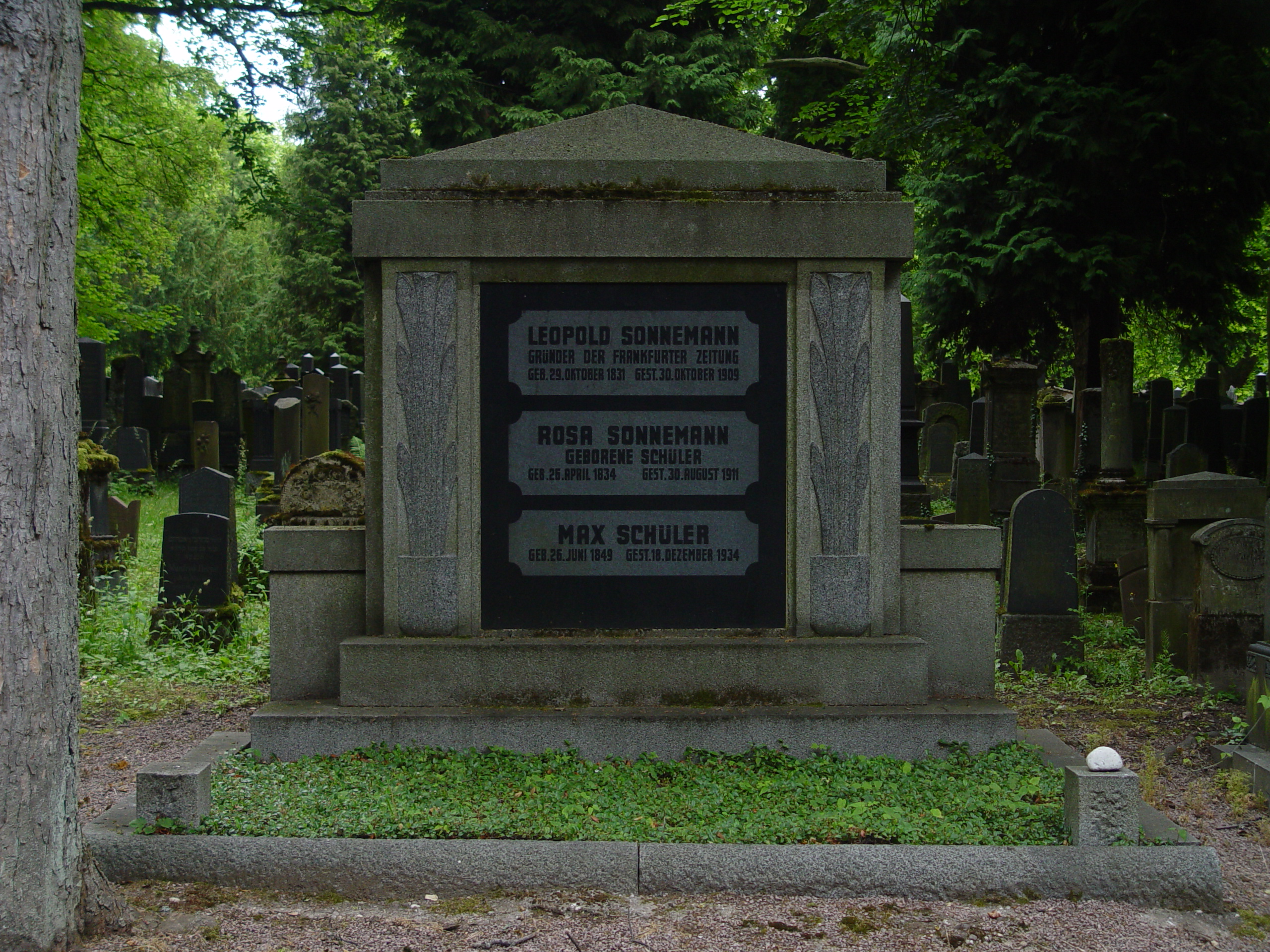 Grabmal Leopold Sonnemann